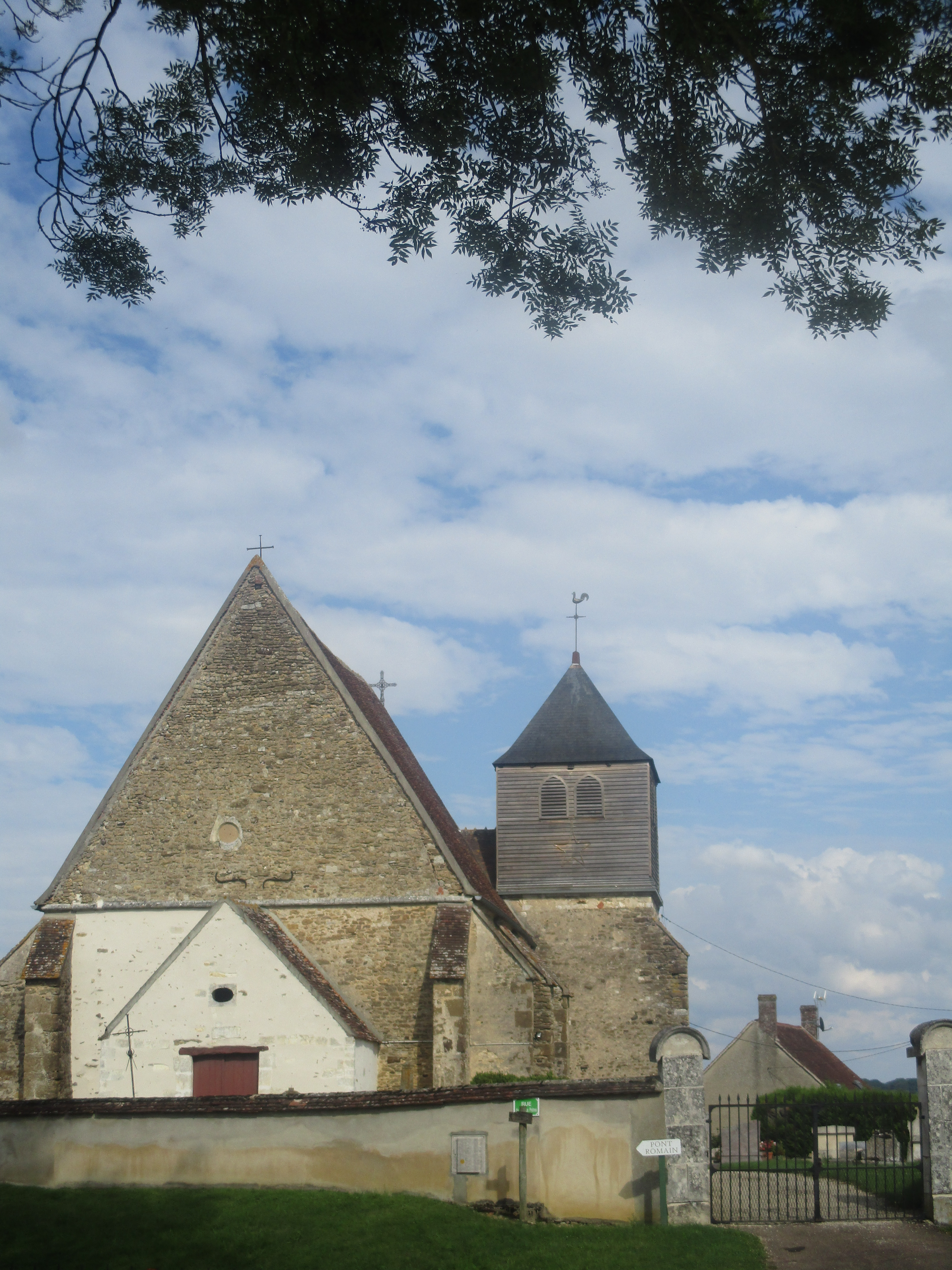 Vue de l'église Saint-Georges de Rouvray, dépendant de la paroisse Saint-Edme de la vallée du Serein (archidiocèse de Sens-Auxerre).